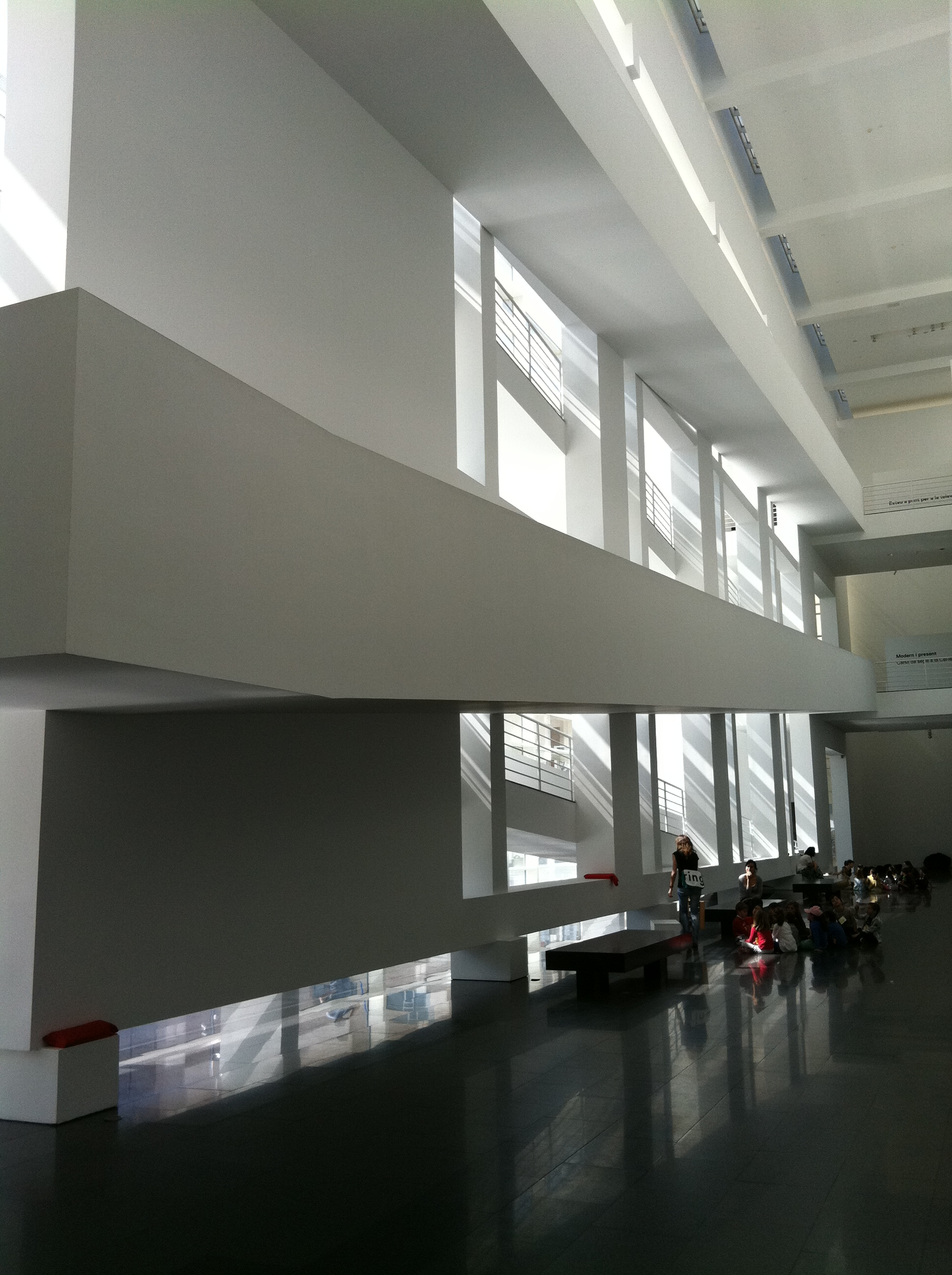 Museu d'Art Contemporani de Barcelona, MACBA